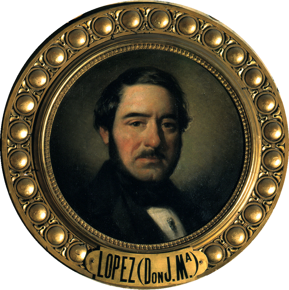 Retrato del politico español Joaquín María López (1798-1855), que llegó a ser presidente del Consejo de Ministros de España.